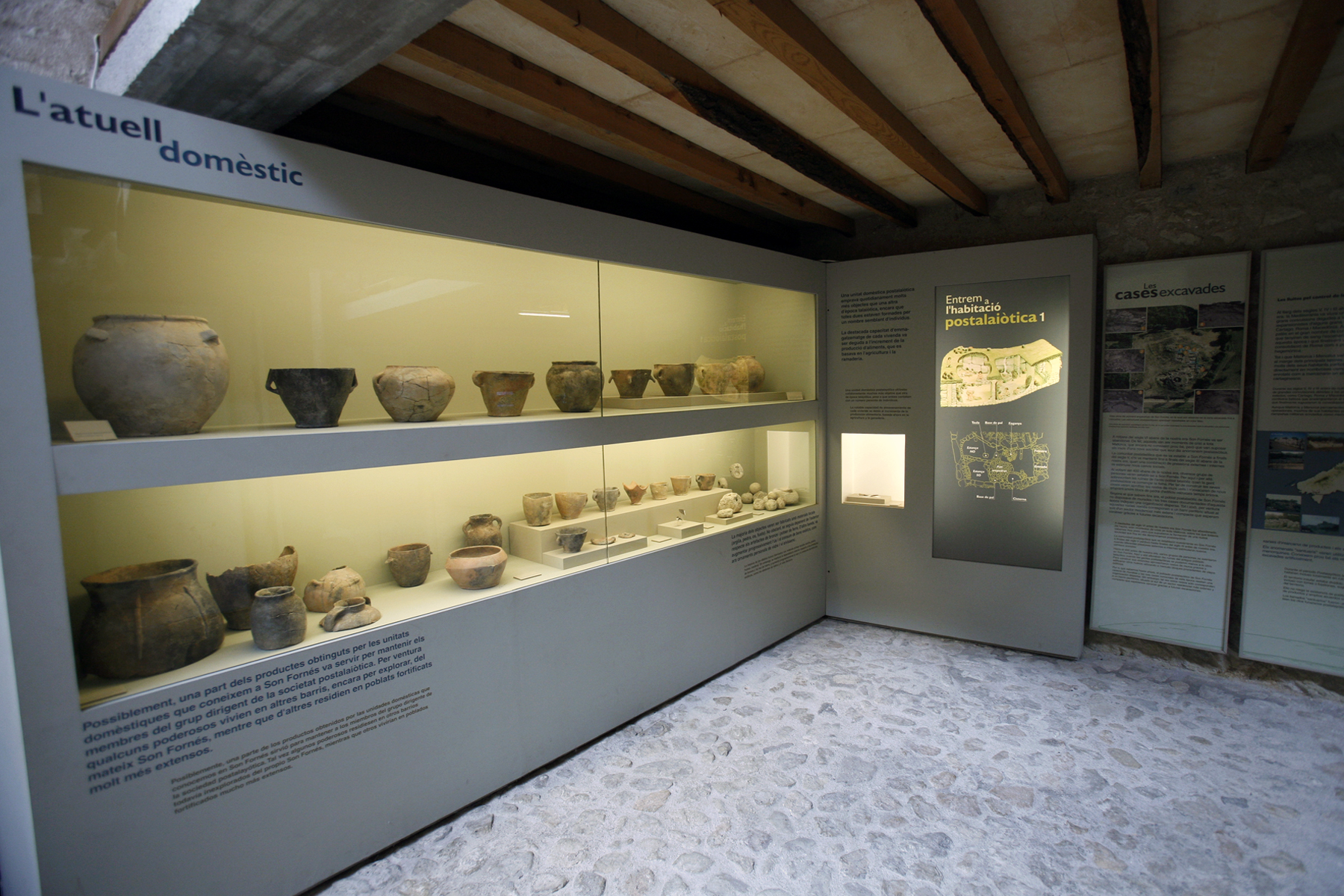 Sala amb materials d'època posttalaiòtica trobats al jaciment de Son Fornés